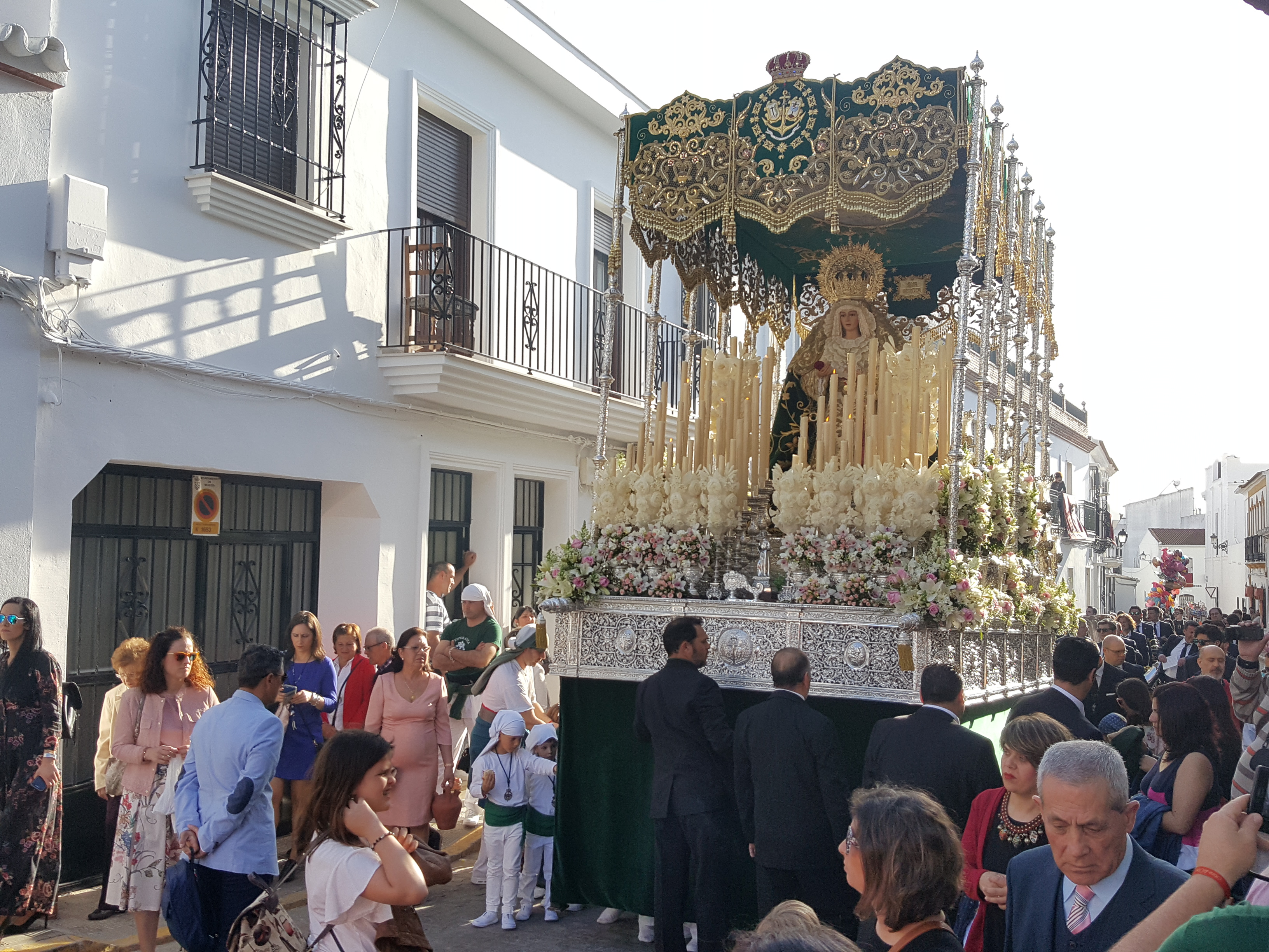 Hermandad de la Borriquita. Desfile procesional del Domingo de Ramos. Vista del desfile por el casco urbano de Moguer.